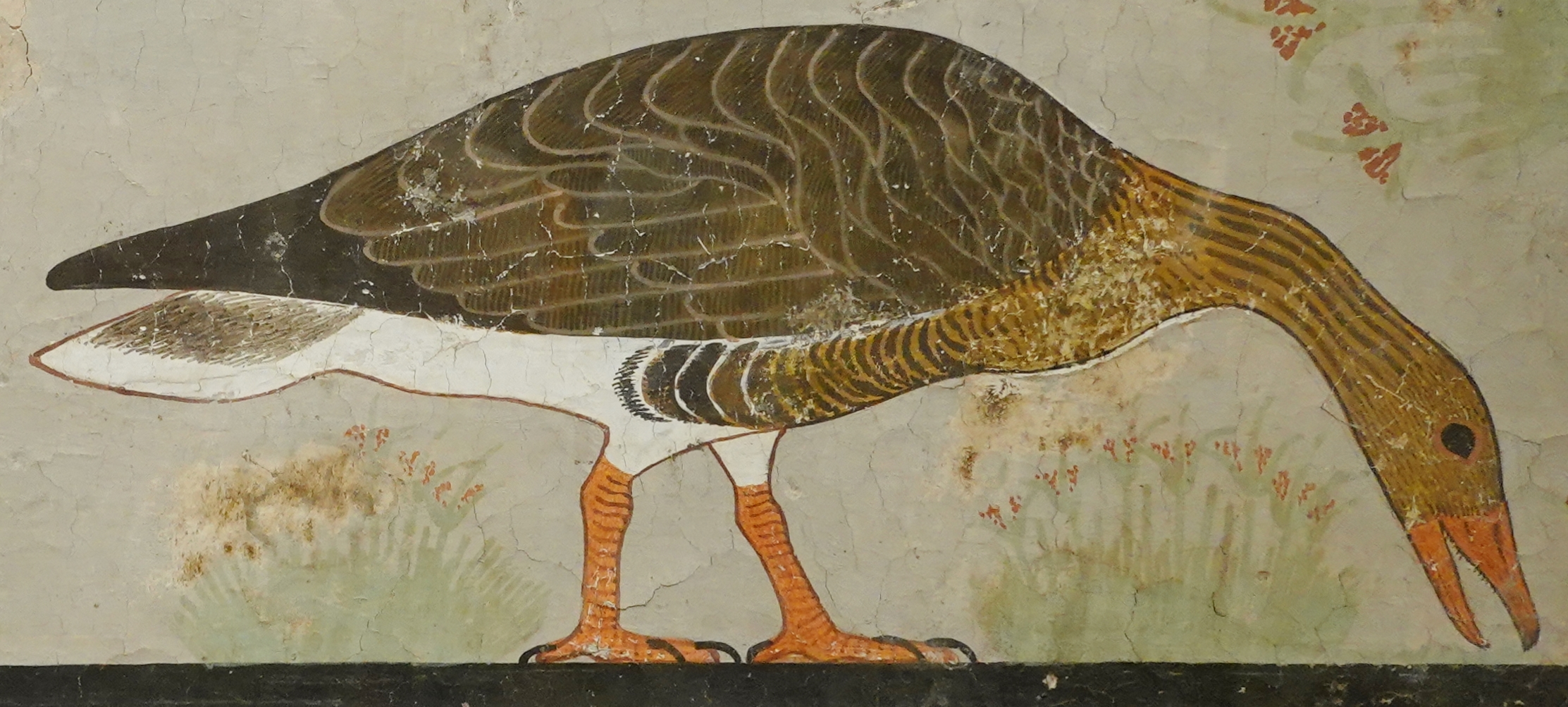 Ausschnitt (rechts) der „Gänse von Meidum“ aus dem Grab von Nefermaat und Atet in Meidum, 4. altägyptischen Dynastie, ausgestellt im Ägyptischen Museum in Kairo, Ägypten